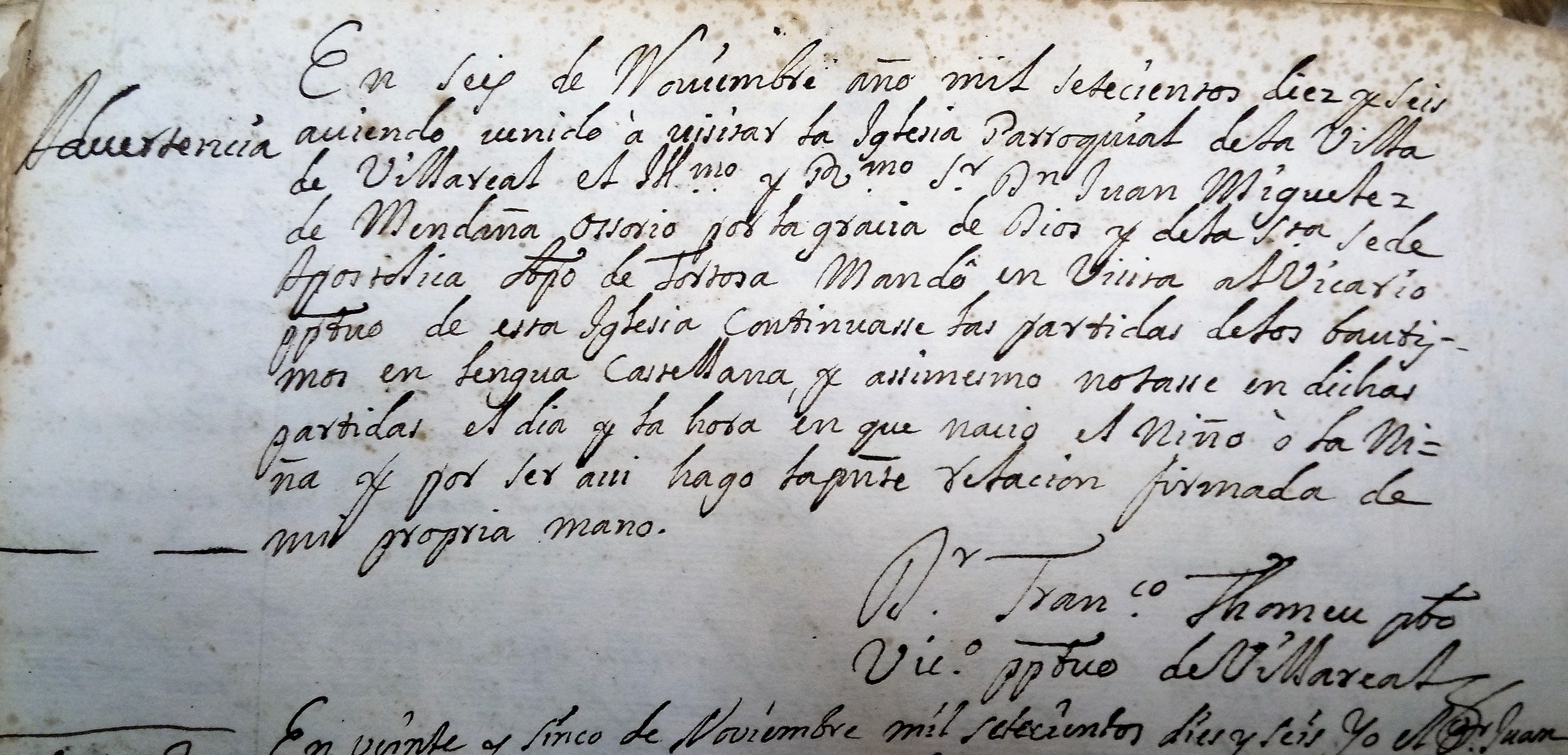 Nota de Francesc Mateu, vicari perpetu de Vila-real en 1716, reflectint-hi al llibre de batejos el manament del bisbe Miguélez d'escriure'ls en castellà.